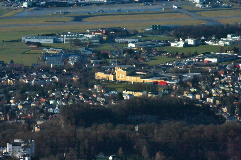 Stieglbrauerei vom Gaisberg aus